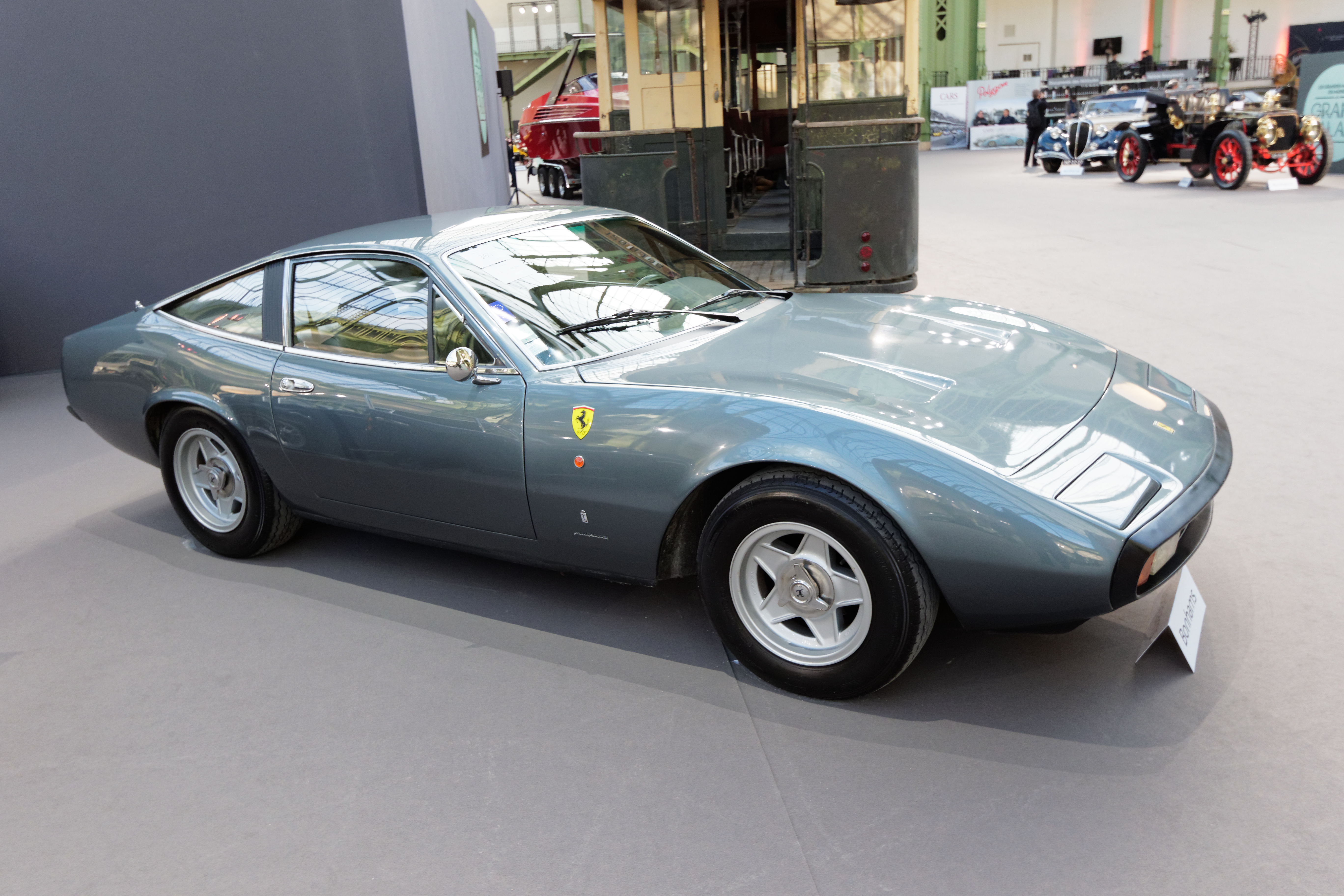 Un des véhicules présenté lors de la vente aux enchères Bonhams 2015 au Grand Palais de Paris.